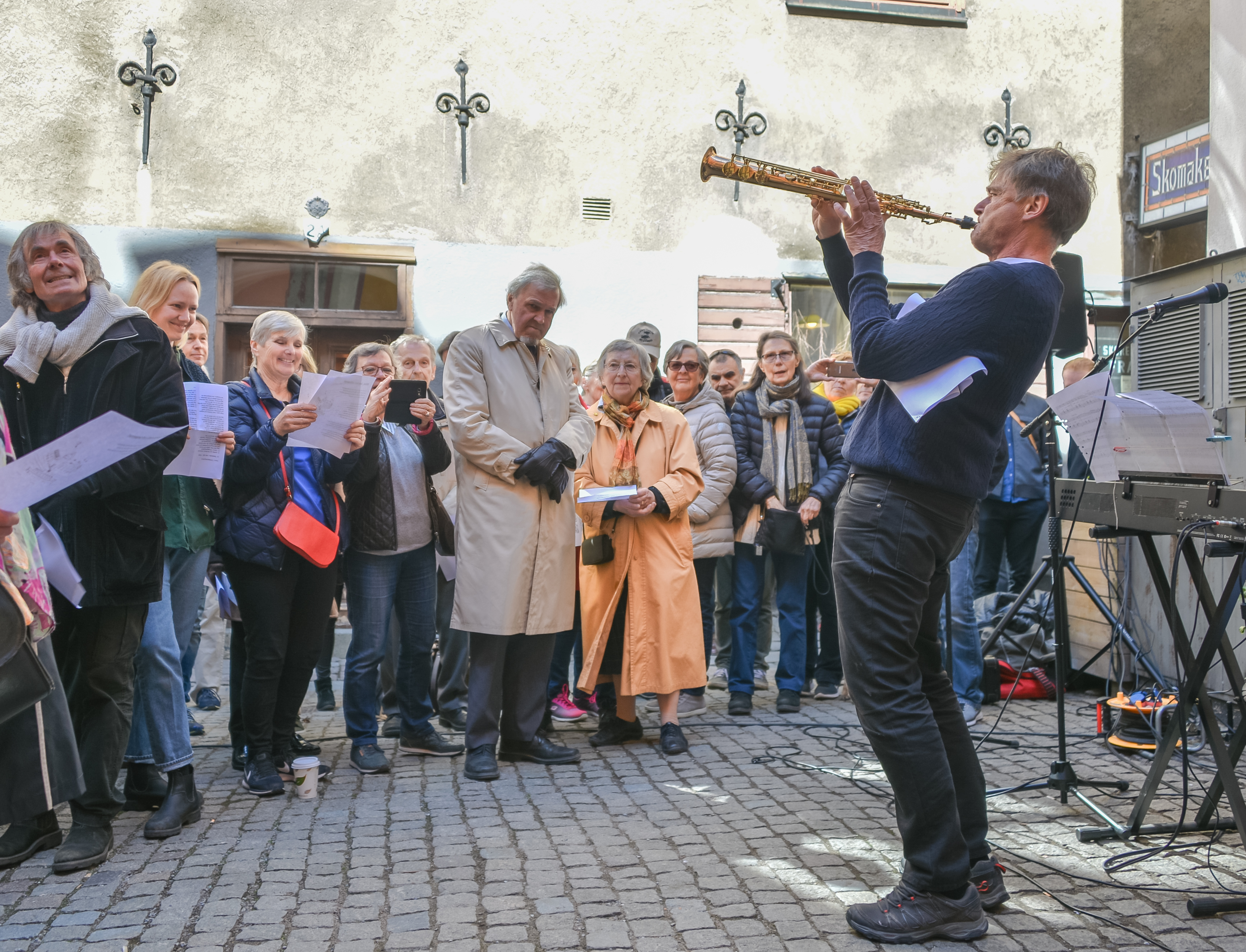 Erik Winqvist musiker, sångare, författare, föreläsare och poet i samband med invigningen av Vera Siöcronas Torg i Gamla stan i Stockholm den 28 april 2018.